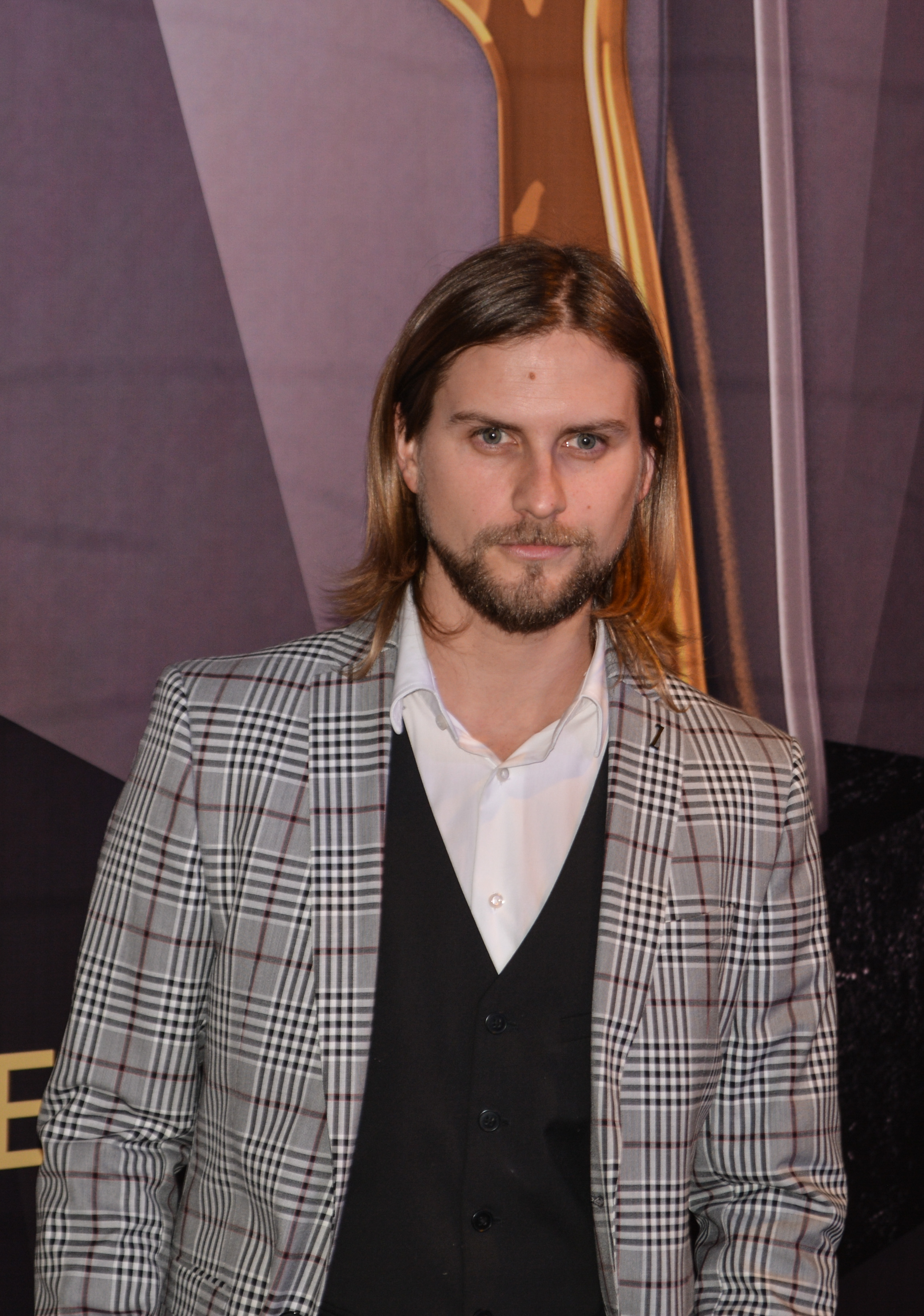 Premios Pulsar 2017